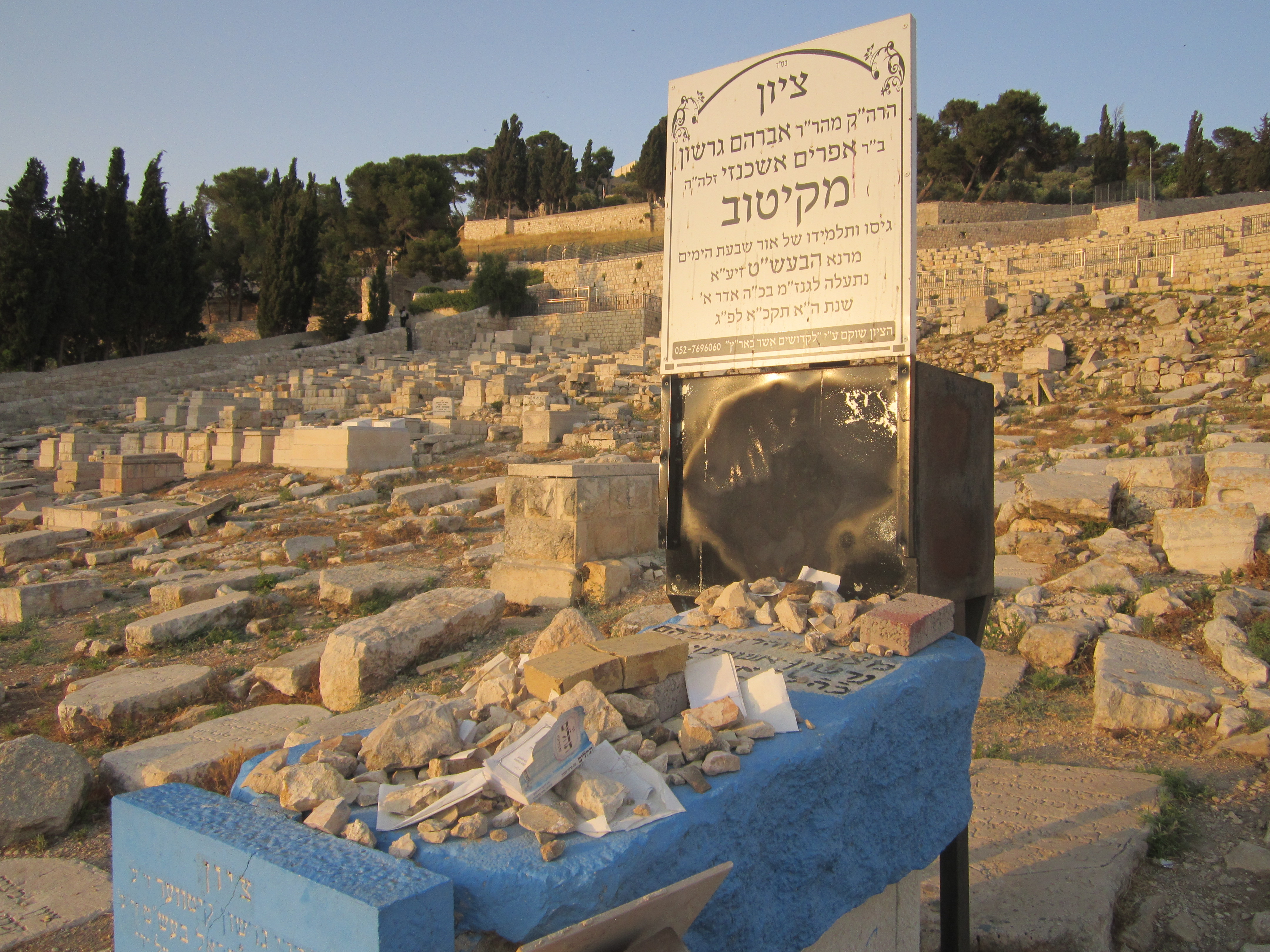 קבר רבי אברהם גרשון מקיטוב בהר הזיתים